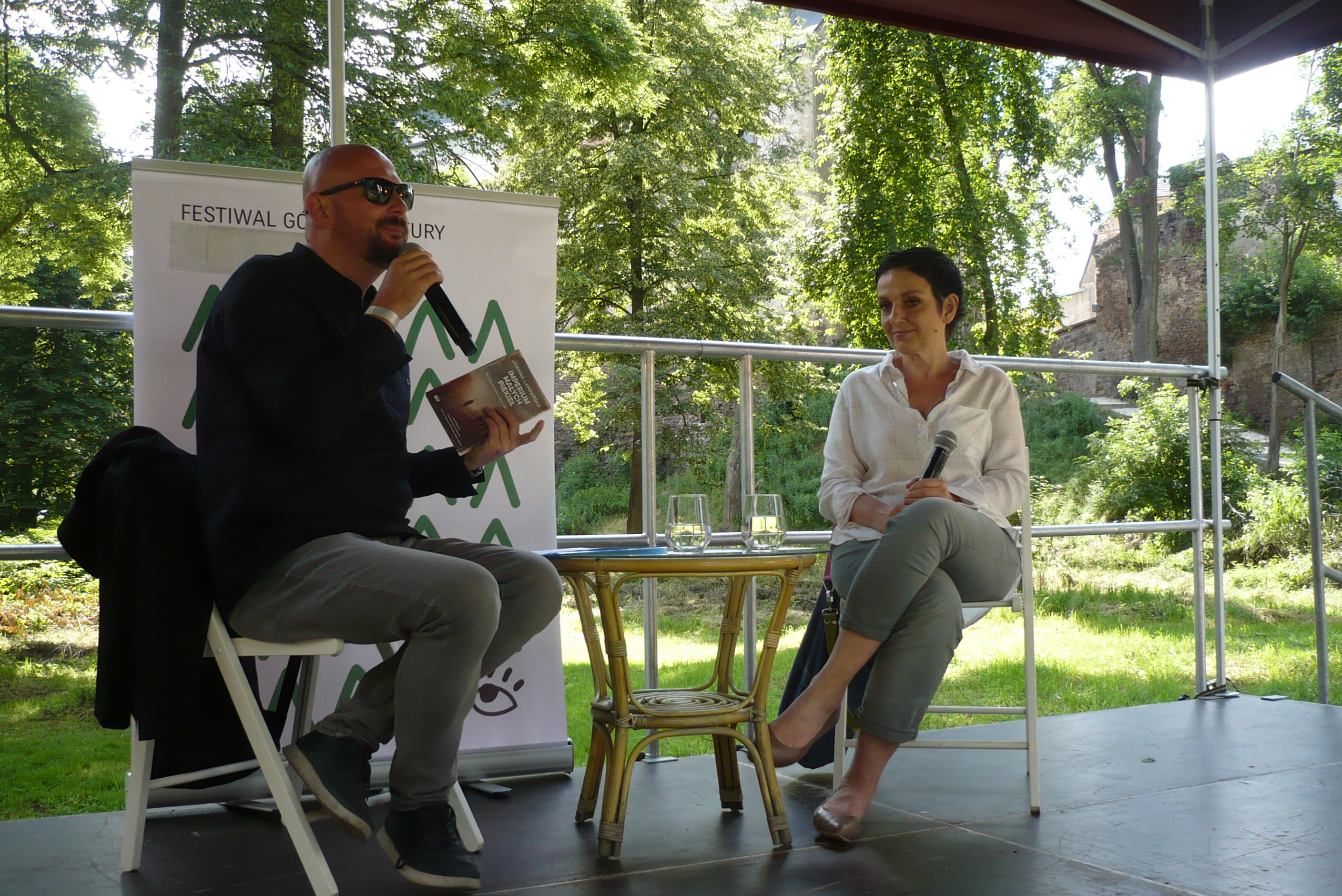 Joanna Lamparska, VI Festiwal Góry Literatury, Zamek Sarny, 2020